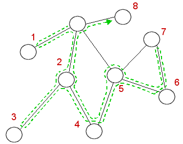 Paieška į gylį